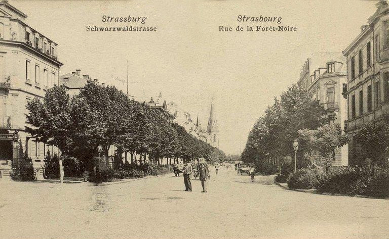 Strasbourg : l'avenue de la Forêt-Noire en 1905. Bibliothèque nationale et universitaire de Strasbourg